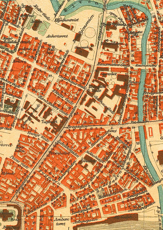 Kart over Vaterland, Kristiania.